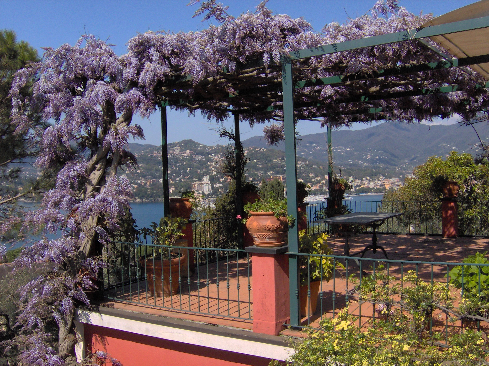 Giardino fiorito con glicine in una villa fra Rapallo e Zoagli, in provincia di genova, Liguria, Italia